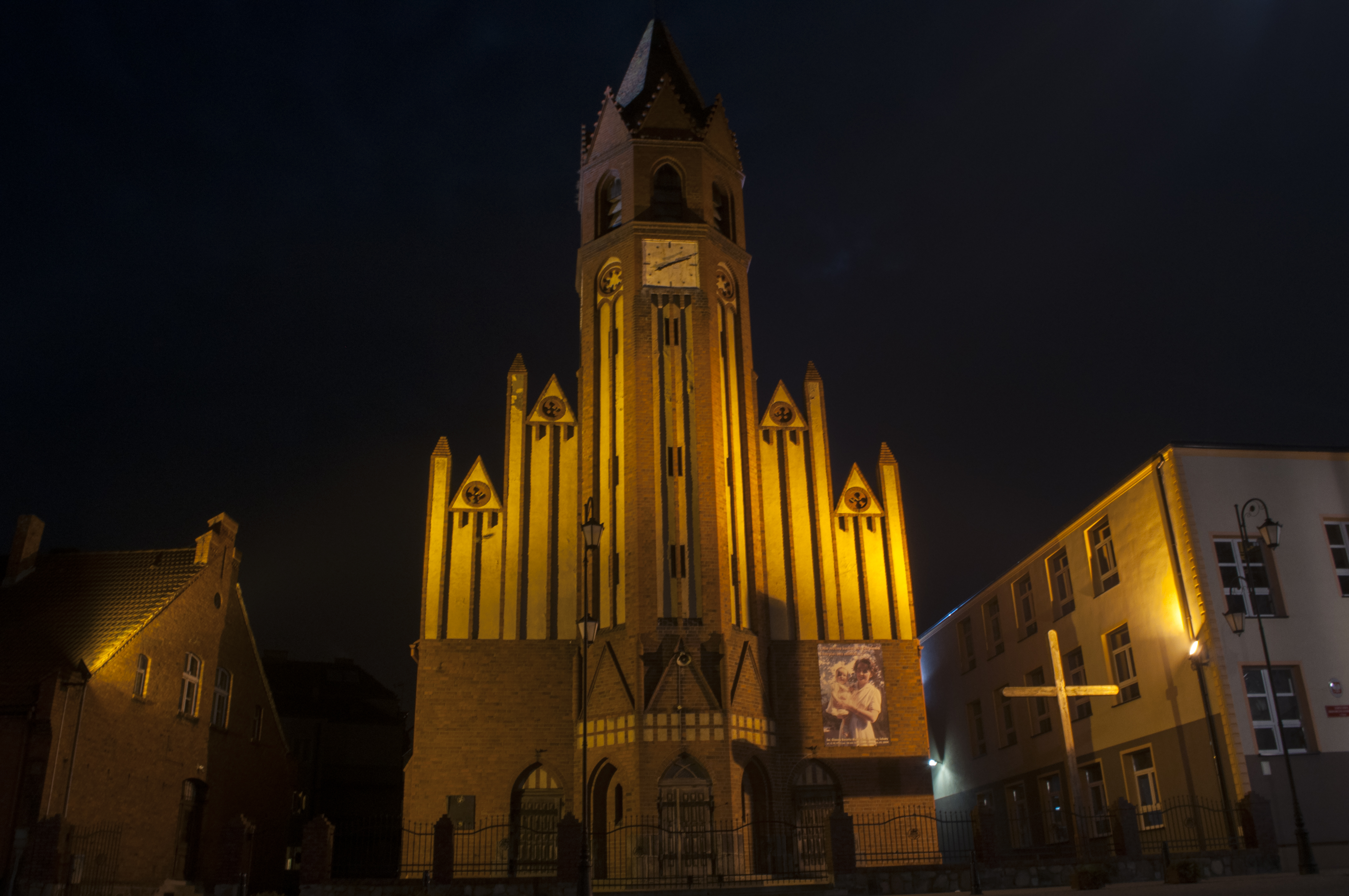 "Mały" kościół w Żninie.